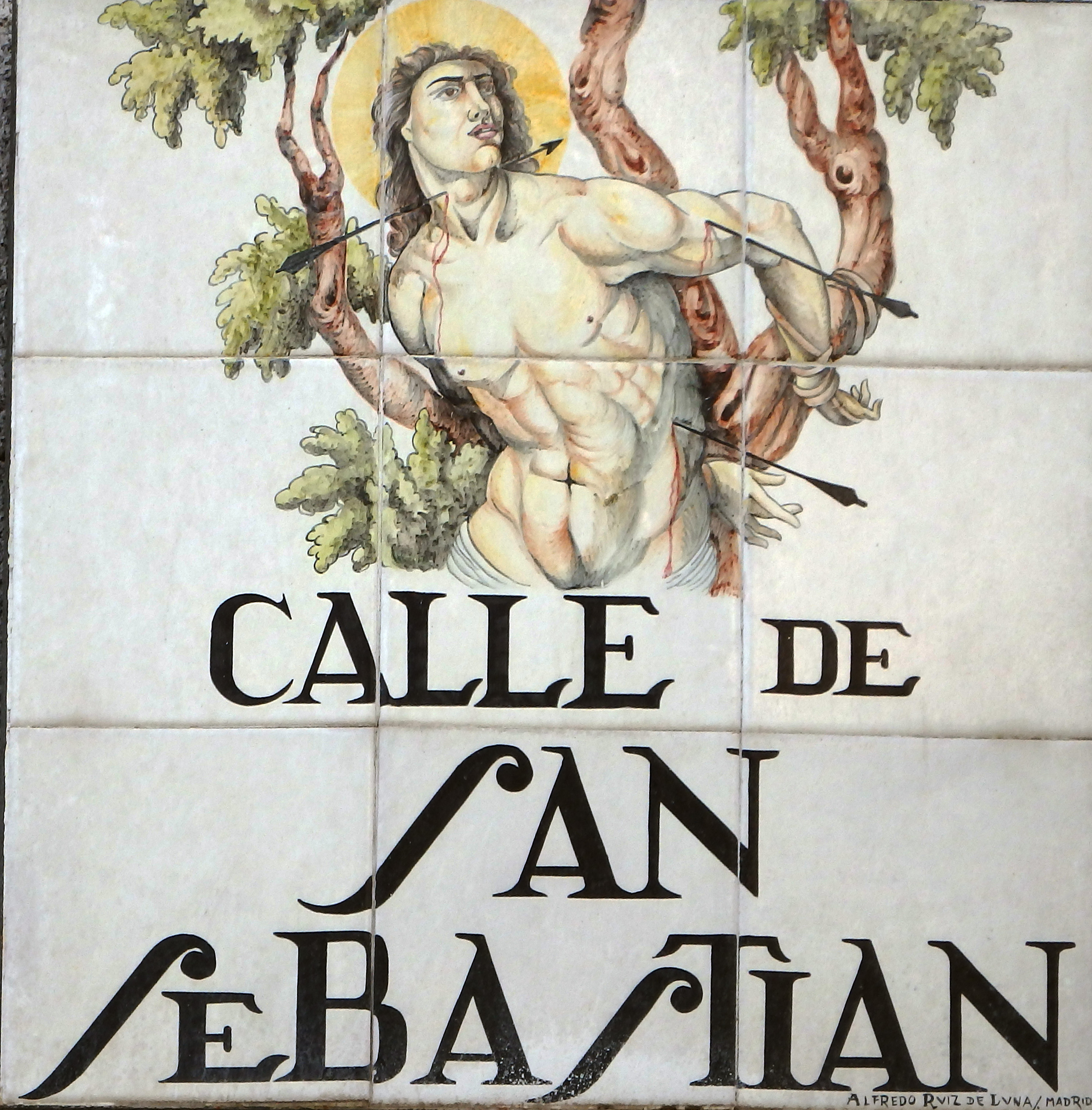 Central Madrid